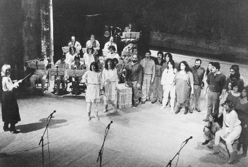 Il Regalo dell'Imperatore, opera di Giovanna Marini, tournée europea con la Scuola Popolare di Musica di Testaccio